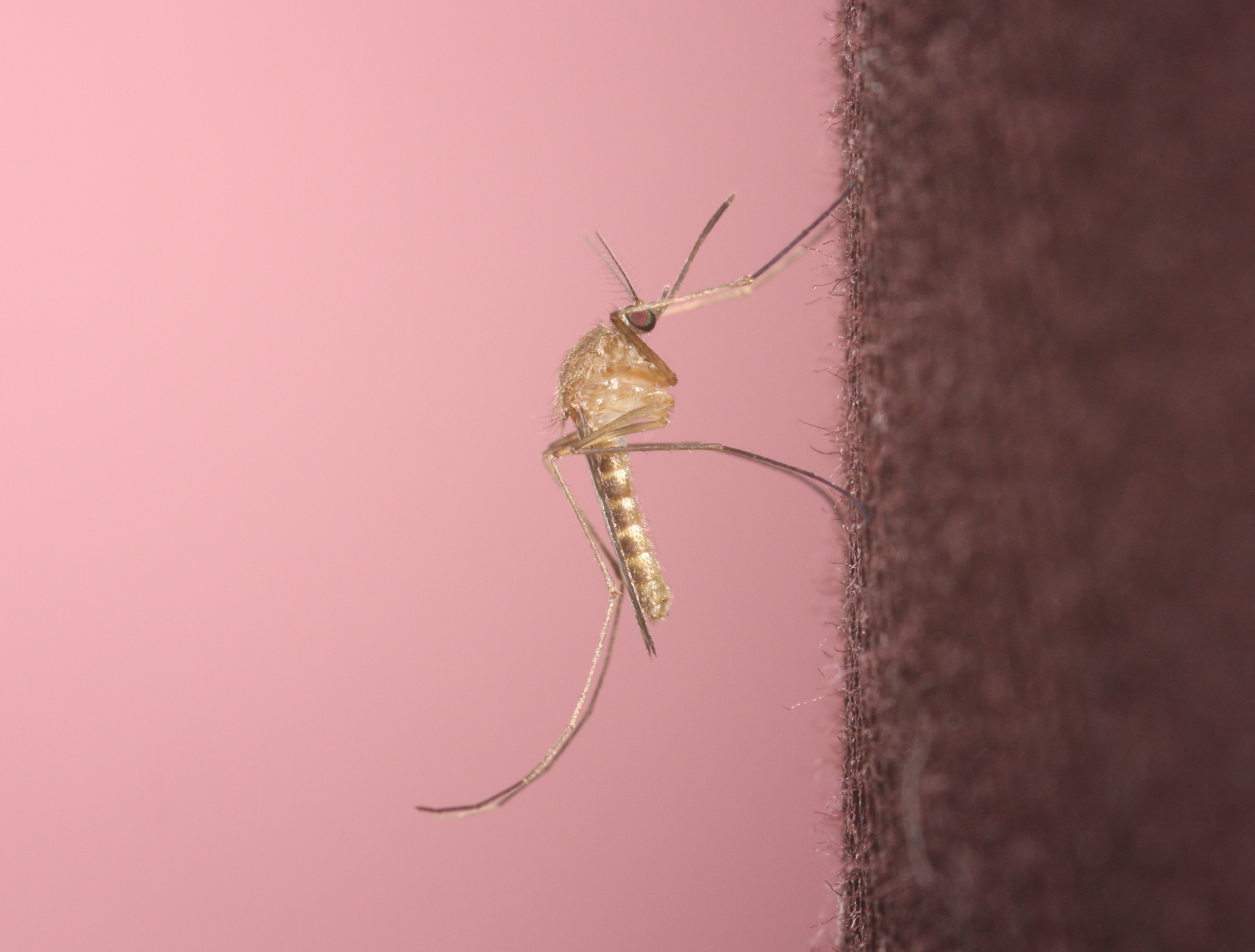 Moustique Culex pipiens prenant la pose